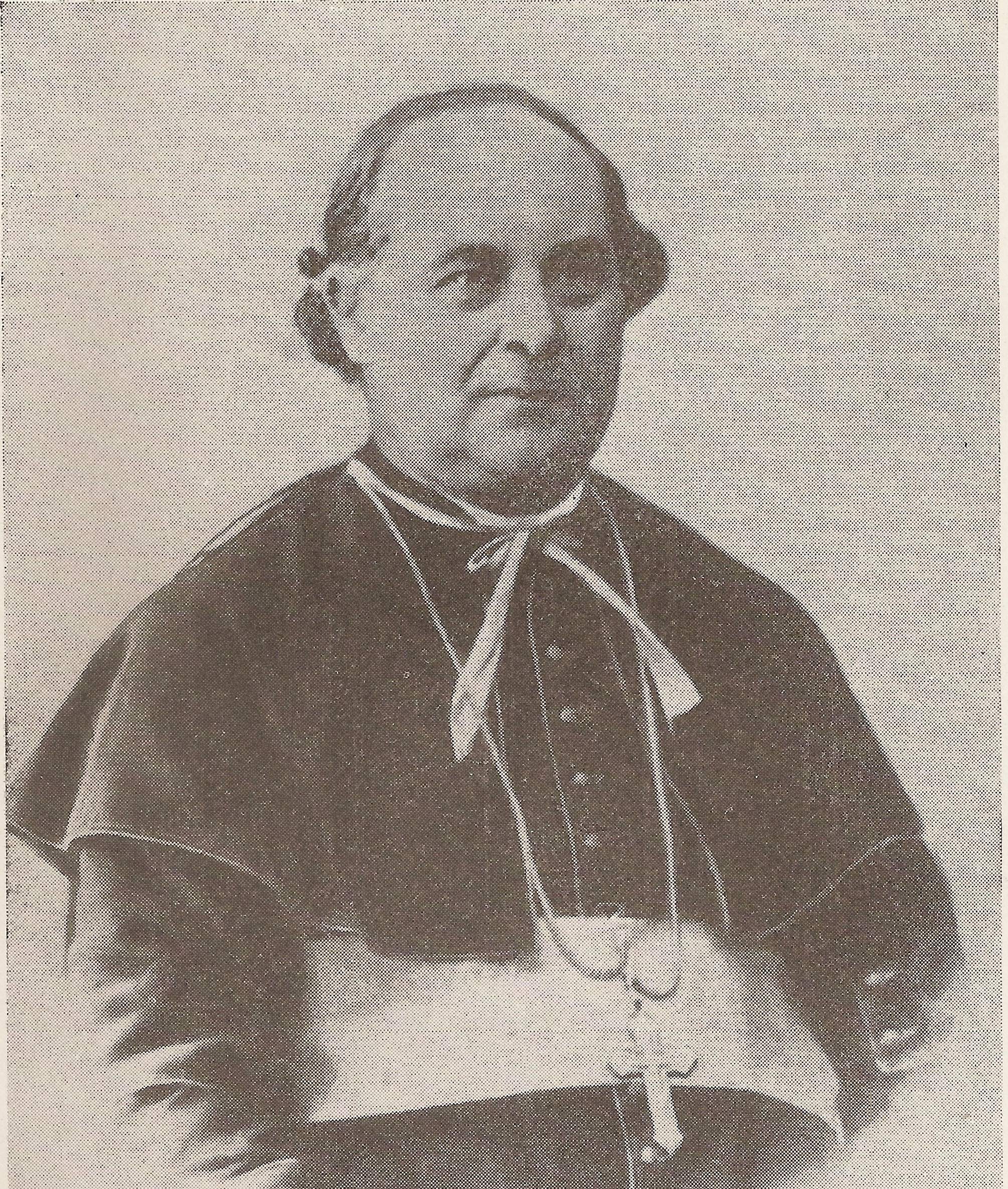 Imatge del bisbe reusenc Miquel Domènech i Veciana